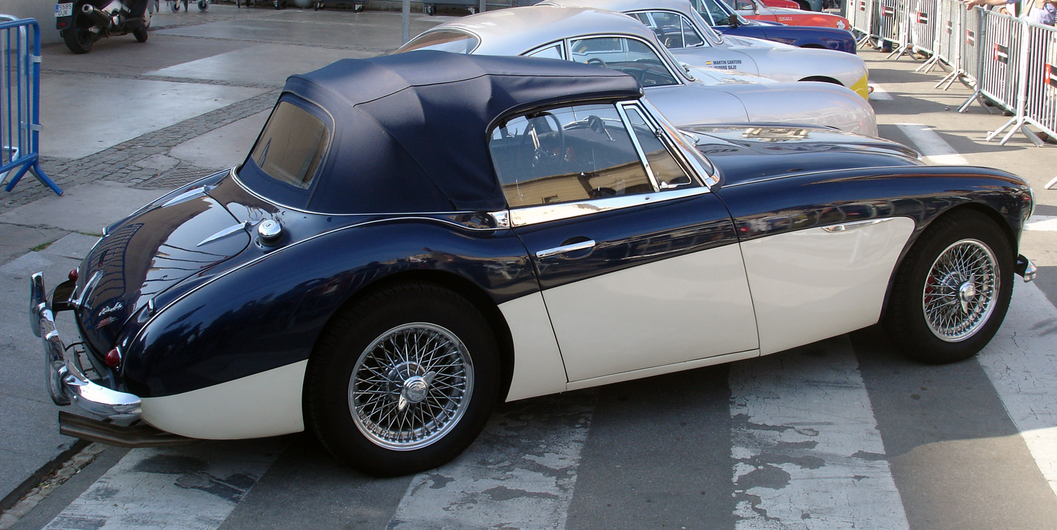 Austin-Healey 3000 Mk III exposat al festival Martini Legends (commemoració del 75 aniversari del Circuit de Montjuïc)